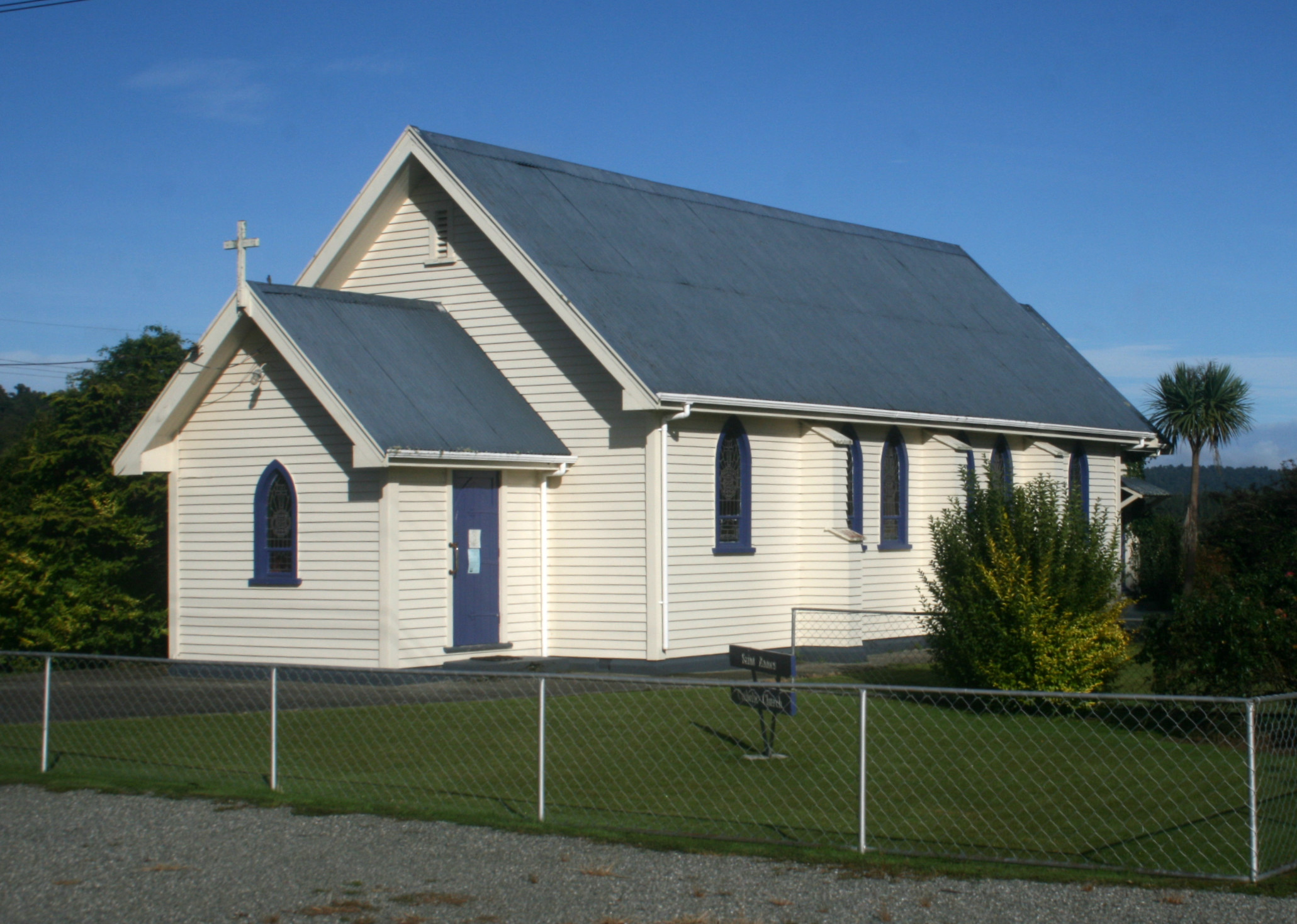 St Annes Church